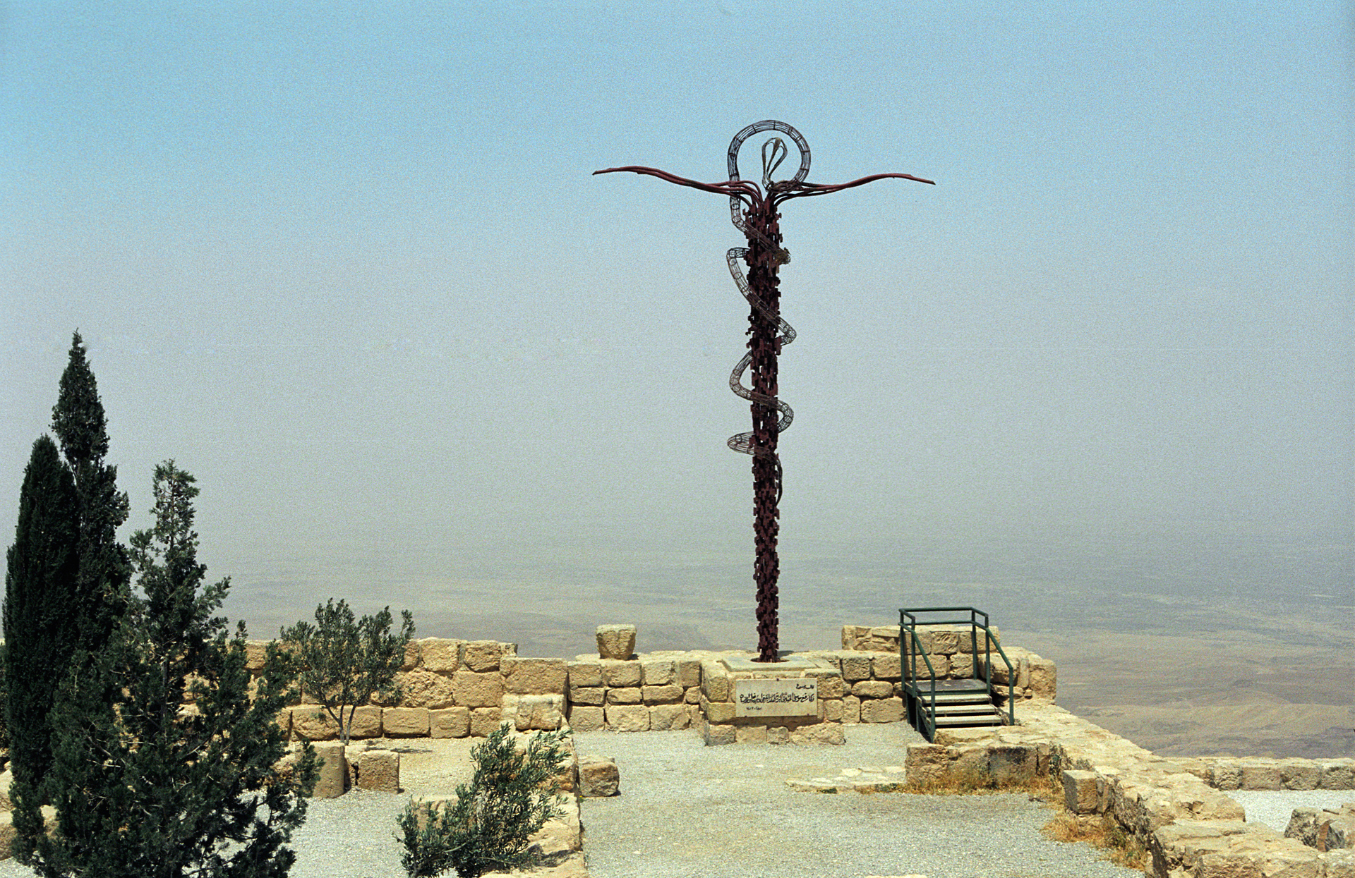 Mount Nebo, Jordan